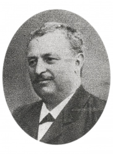 Leopold Diwald (1862 - 1927), Rakouský politik.